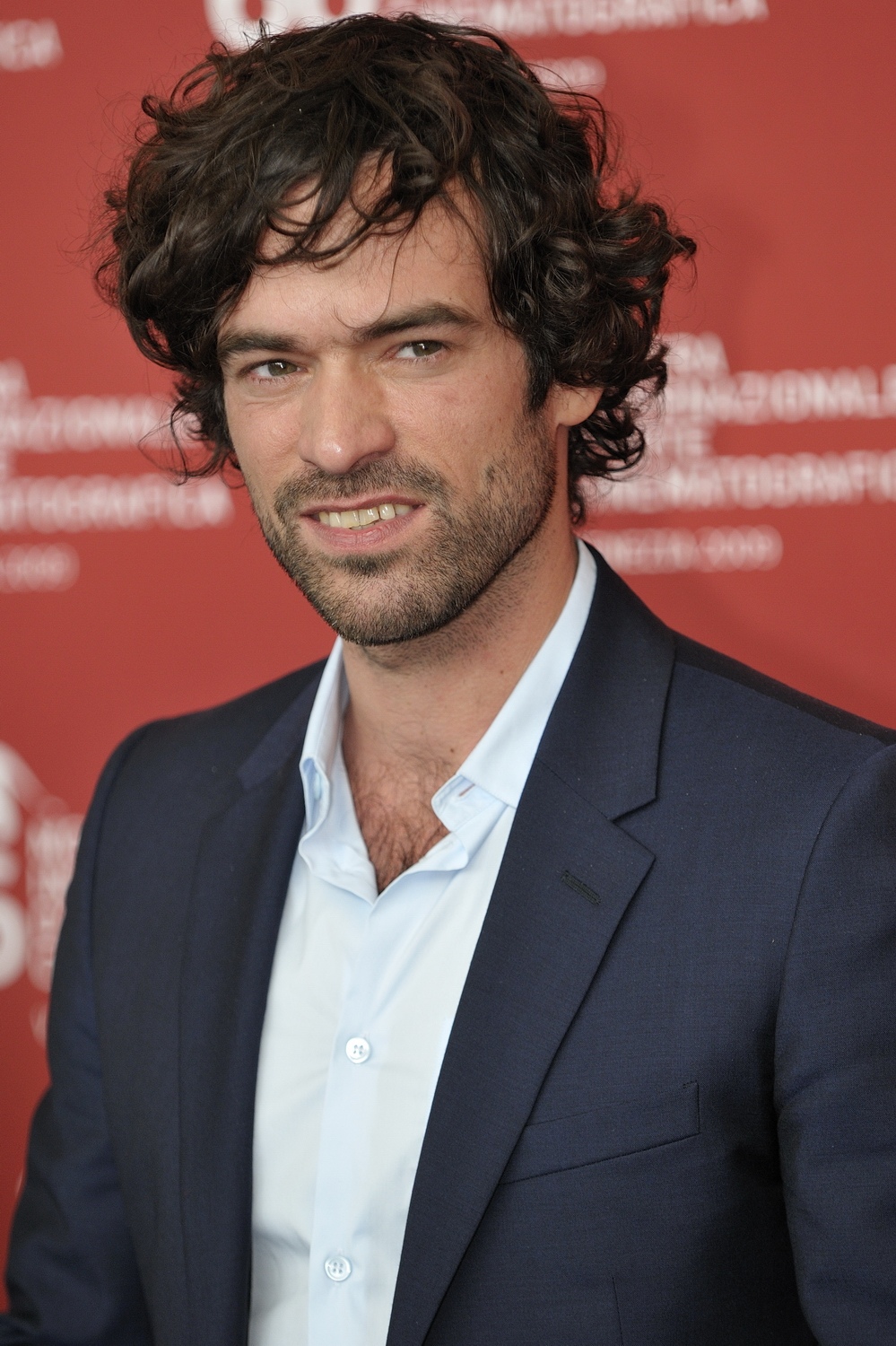 66ème Festival du Cinéma de Venise (Mostra), 4ème jour (05/09/2009) Photocall avec Romain duris pour le film : Persécution